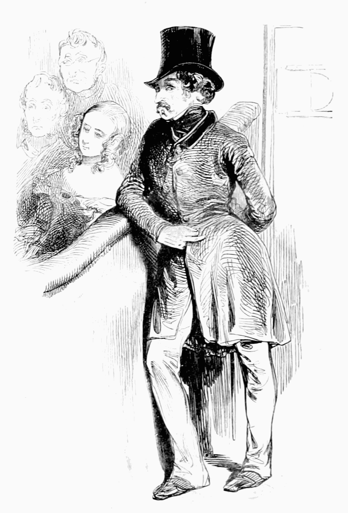 Thêatres - d249 - SALOMON, dit PIGEONNEAU, chef de claque